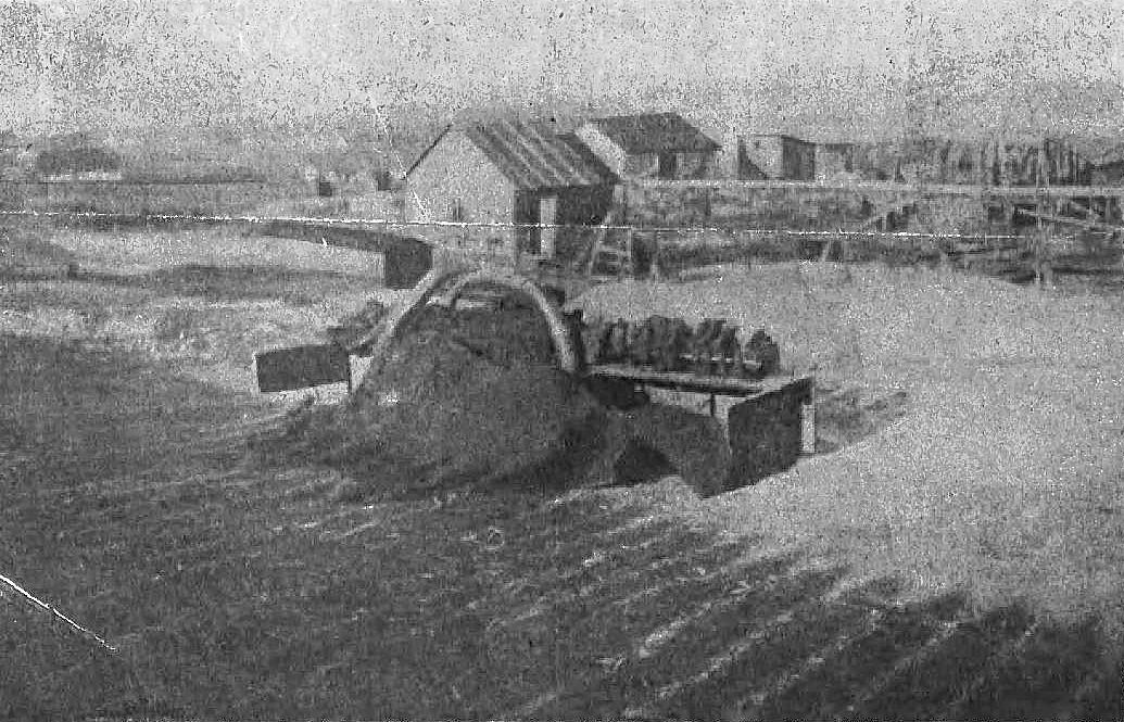 Wykopalisko w Staruni (X.1907)